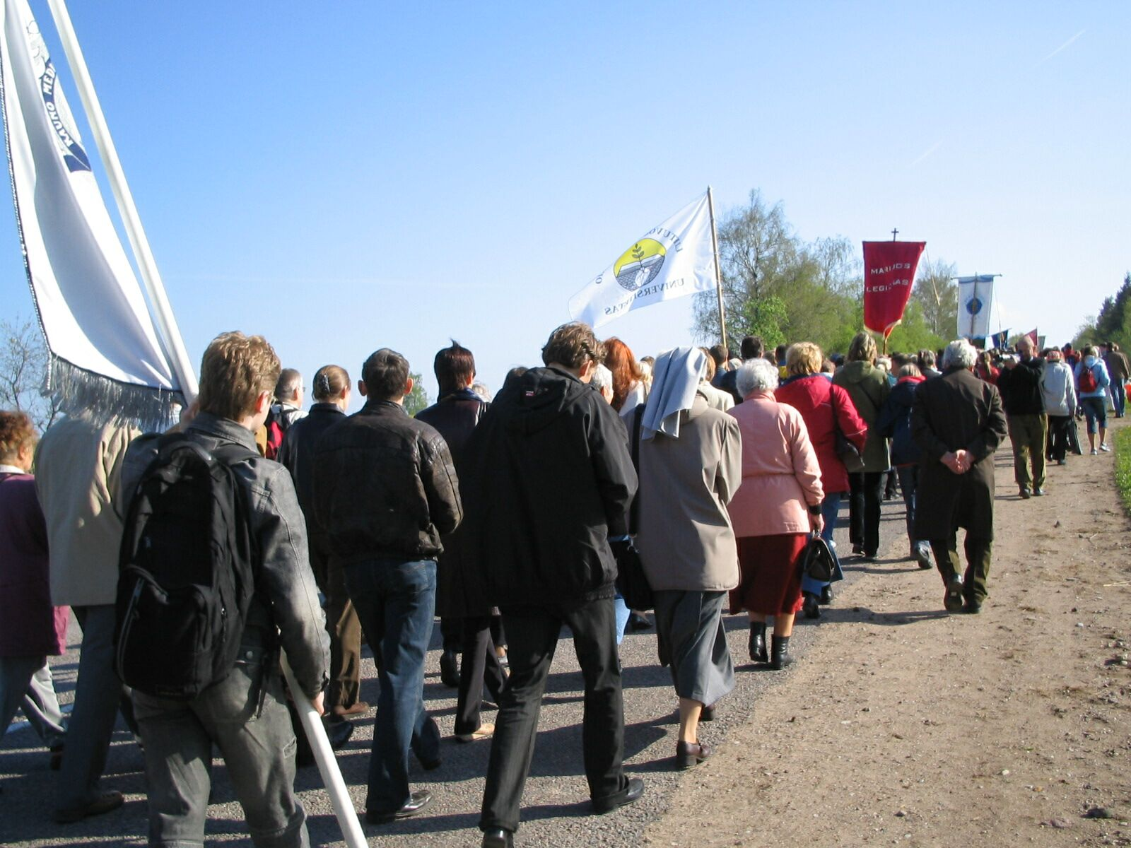 Piligrimų kelionė 2007 m. gegužę.